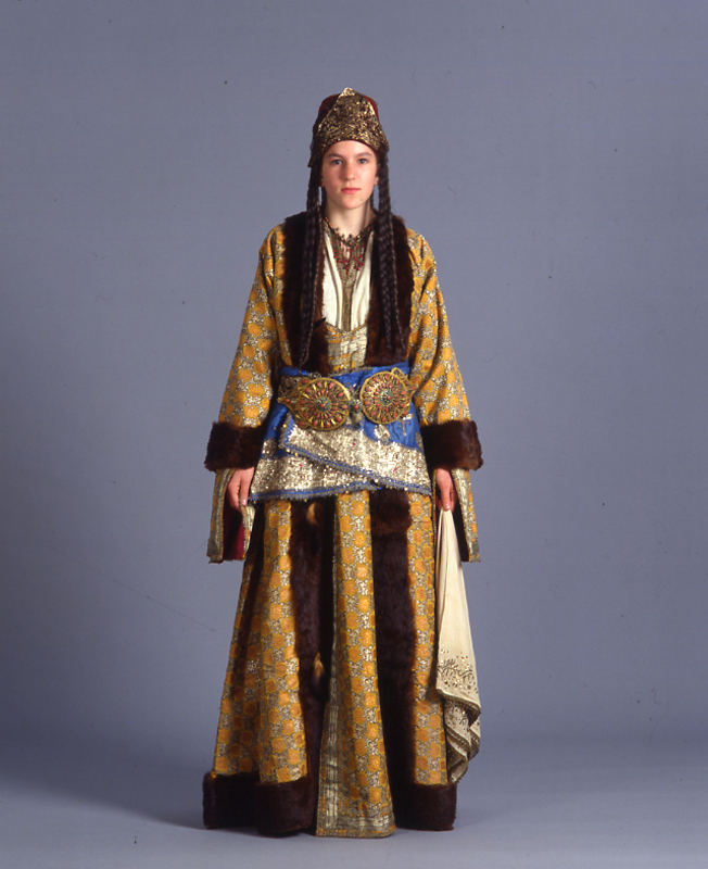 Φορεσιά Ελλήνων της Σίλλης Ικονίου, Μικρά Ασία Αρχές 20ού αιώνα Συλλογή Πελοποννησιακού Λαογραφικού Ιδρύματος, Ναύπλιο